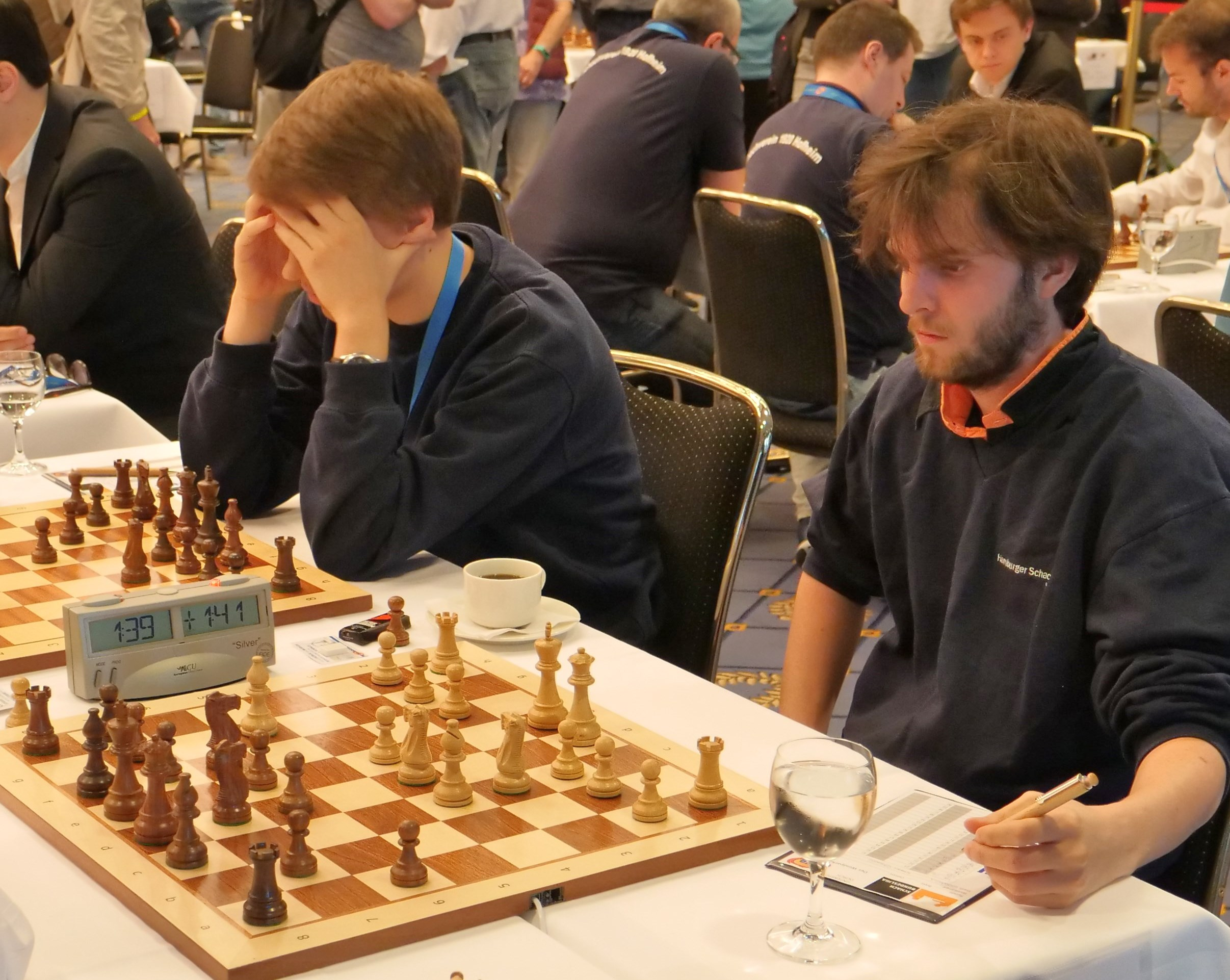 Grandelius und Svane - Bundesliga-Endrunde 30-4-2018